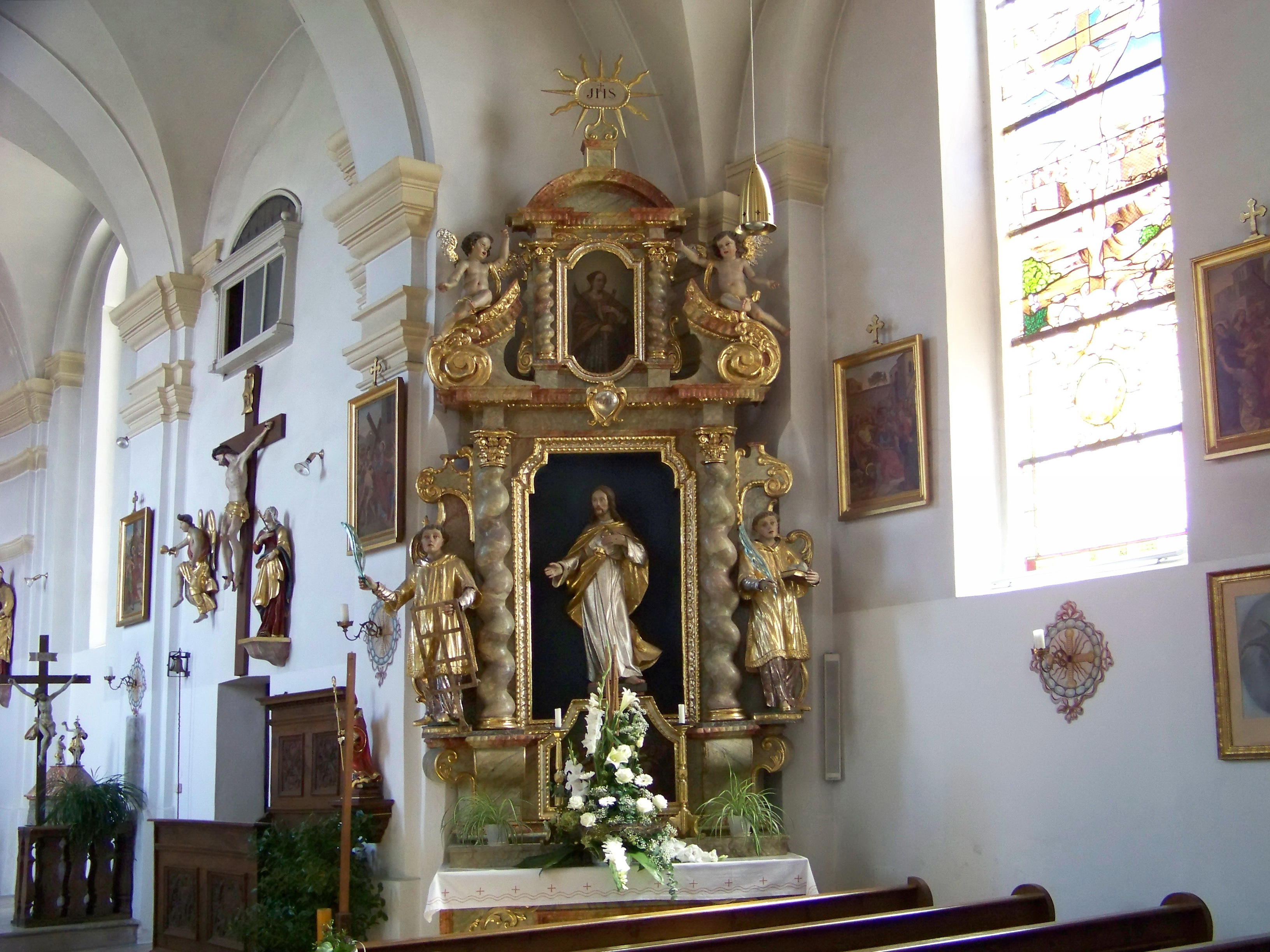 Weihmichl, Hauptstraße 24. Pfarrkirche St. Willibald. Saalkirche mit eingezogenem Chor, Langhaus und Chor barock. Rechter Seitenaltar Herz Jesu. Seitenfiguren St. Laurentius und St. Stephanus.